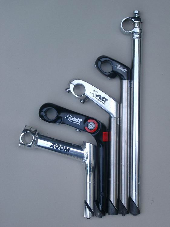 Bildbeschreibung: Fahrrad-Vorbauten mit Klemmschaft in div. Ausführungen und Maßen Fotograf/Zeichner: Corda 09:57, 14. Mai 2006 (CEST) Datum: 13.05.06